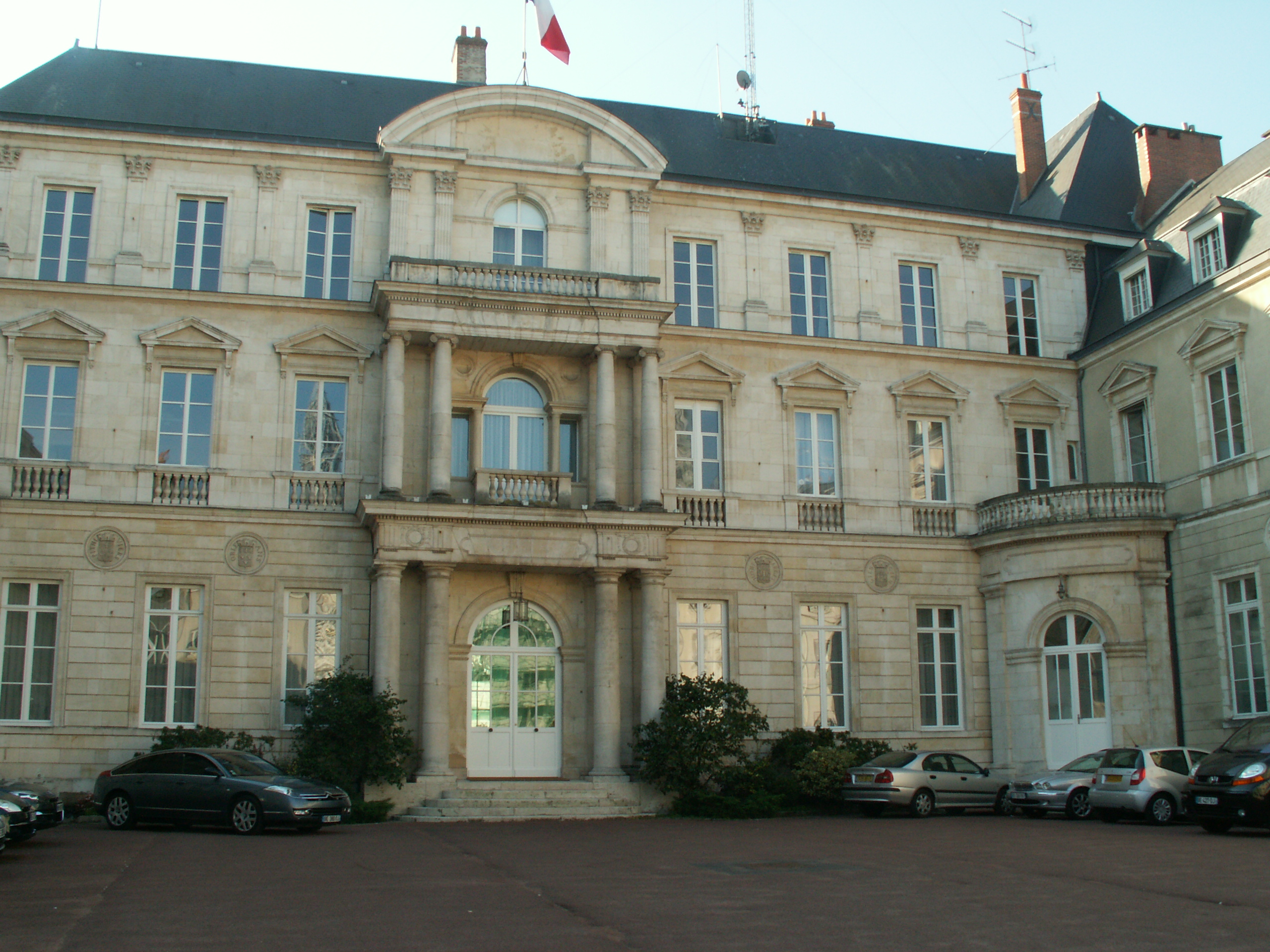 This building is en partie classé, en partie inscrit au titre des Monuments Historiques. .